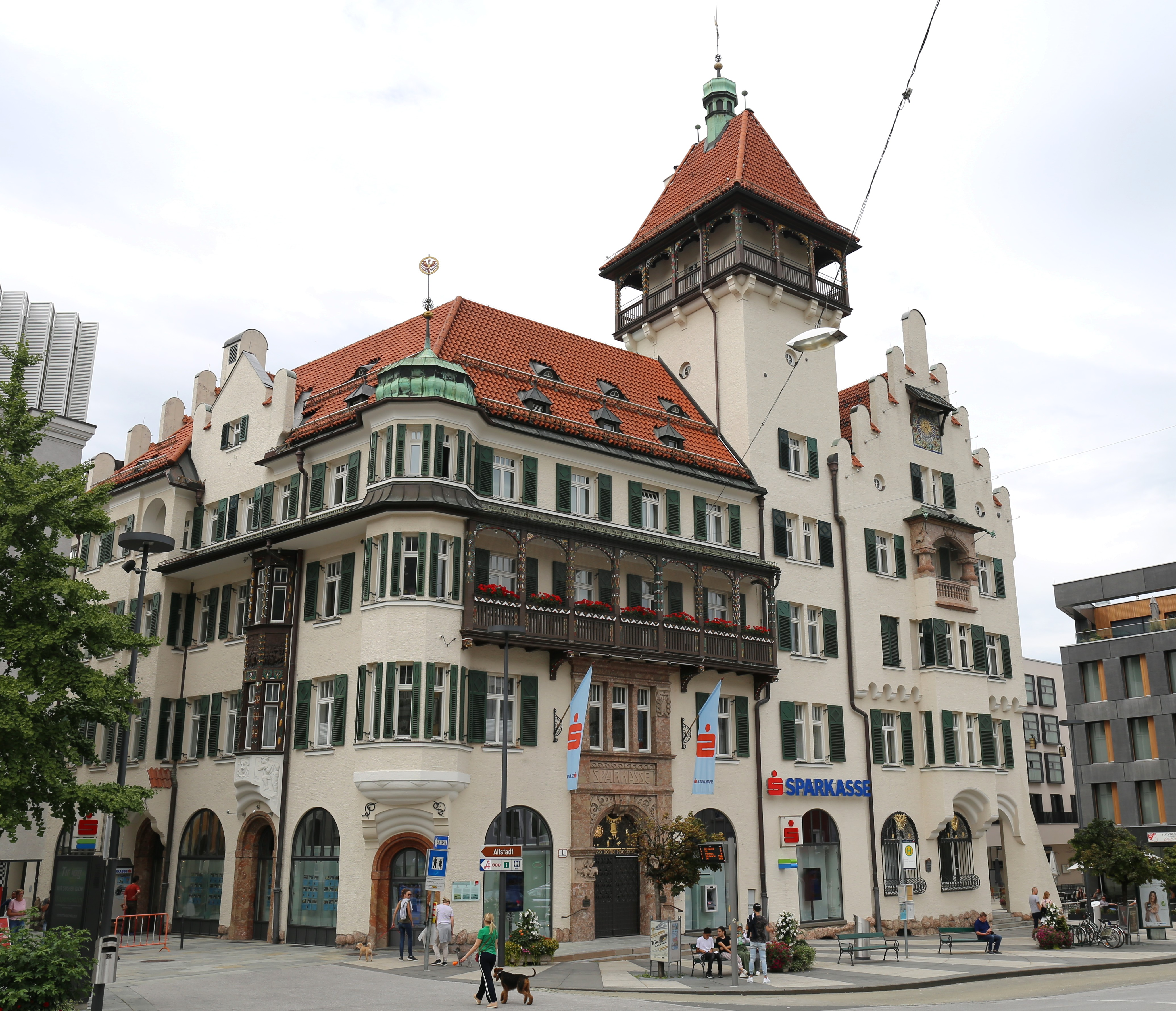 Oberer Stadtplatz 1, Kufstein; Sparkasse, errichtet 1906/07